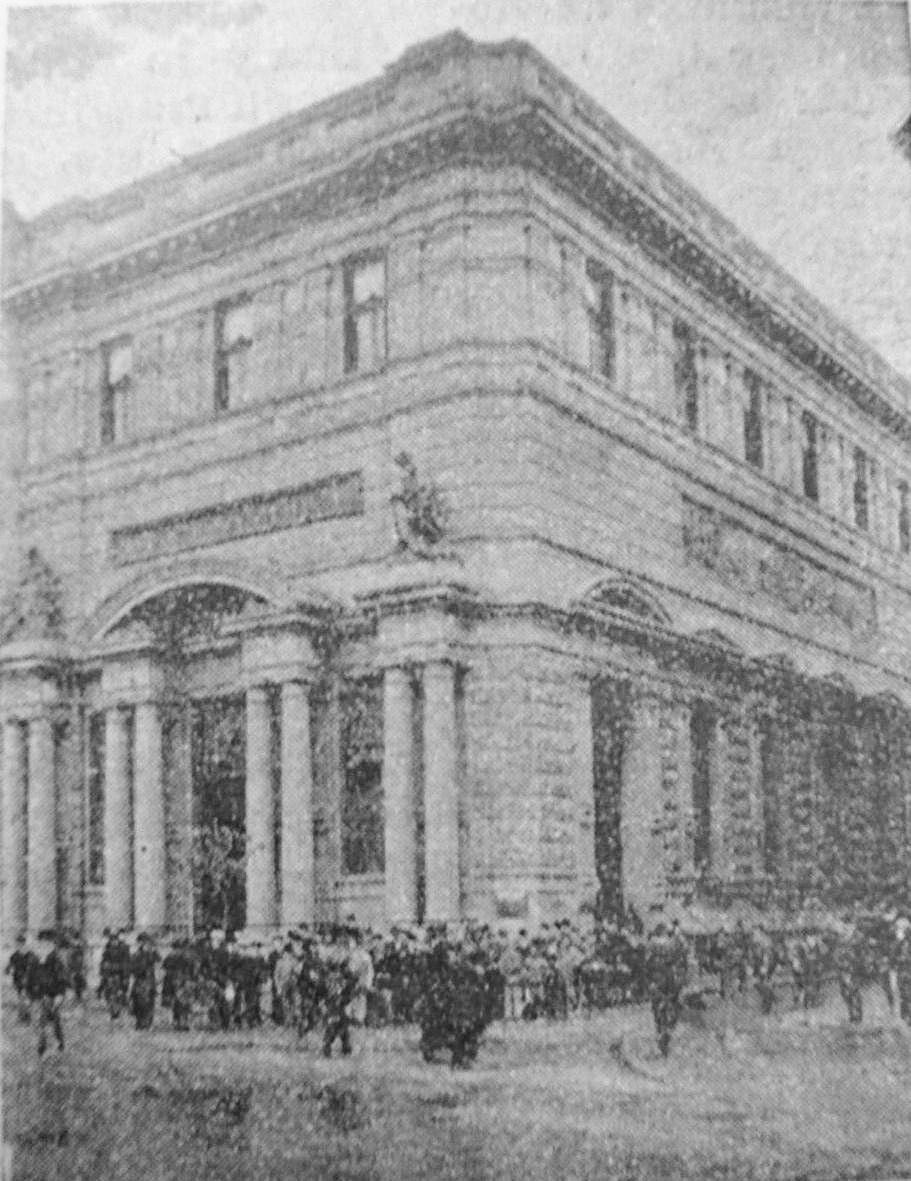 Un grupo de gente se acerca al edificio del Nuevo Banco Italiano (Av. Rivadavia, esq. Reconquista) para observar los resultados de un incendio que habría comenzado a la madrugada del jueves 23 de noviembre de 1902. Este edificio del Nuevo Banco Italiano sería reemplazado en 1932 por el actual.